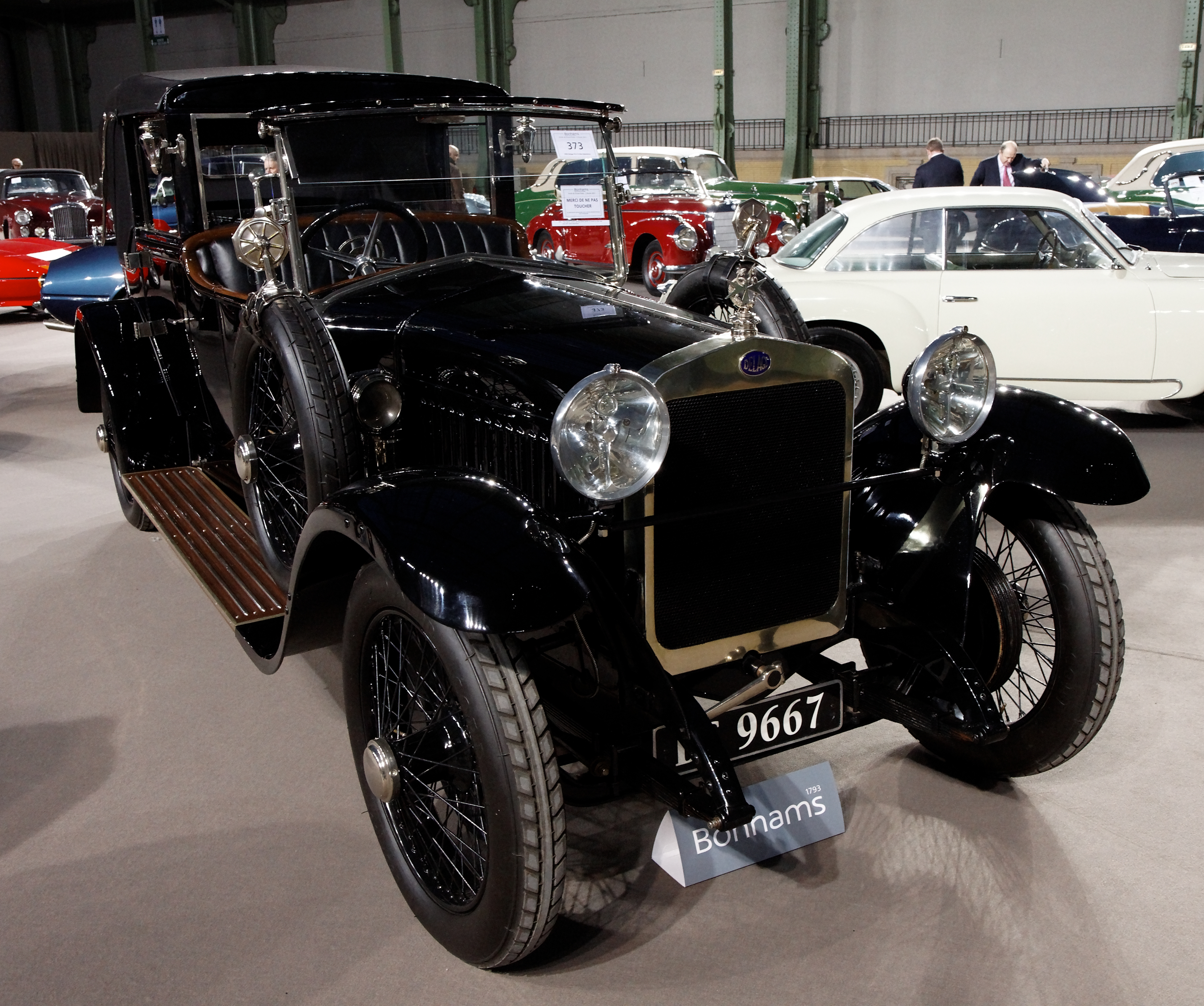 Delage CO 4 ½ litre Salamanca